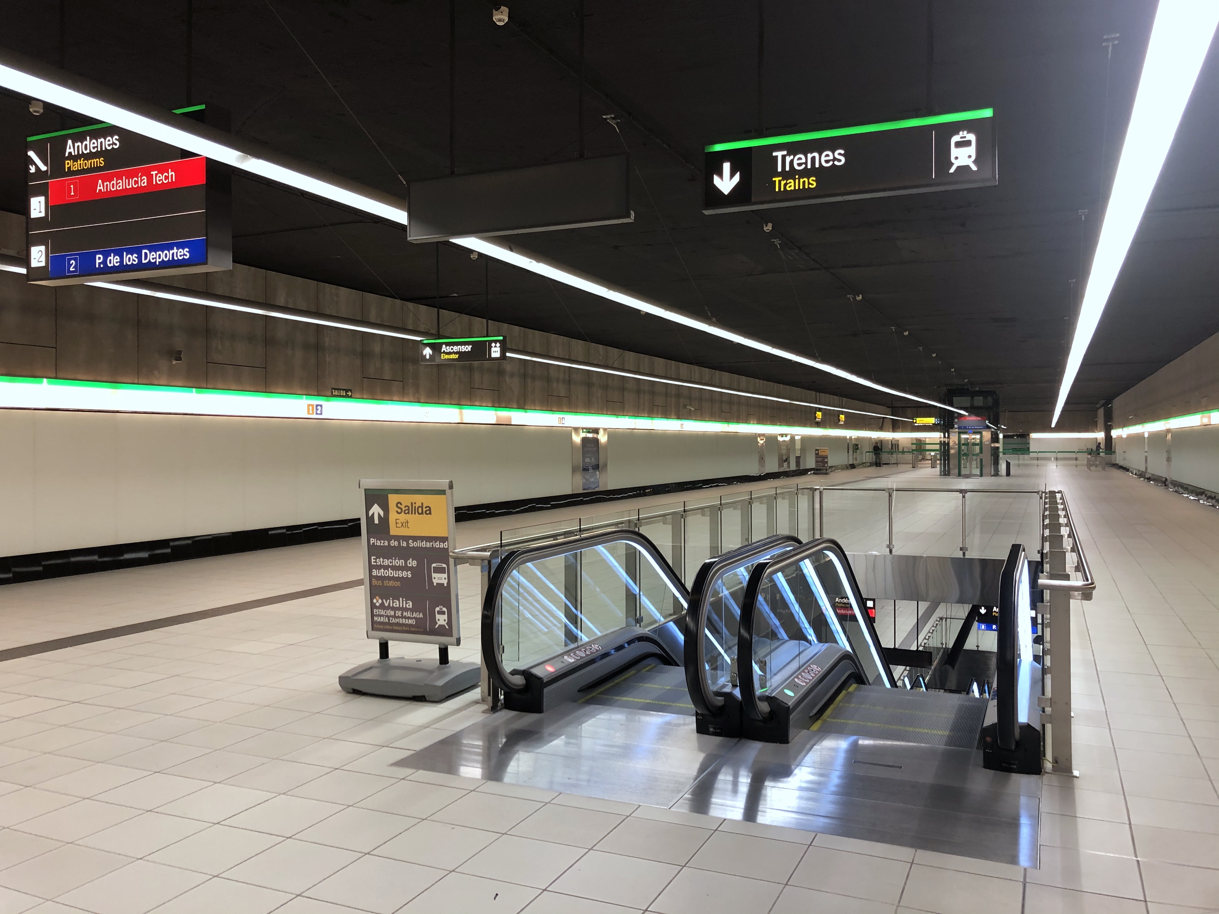 Vestíbulo de la Estación El Perchel del Metro de Málaga